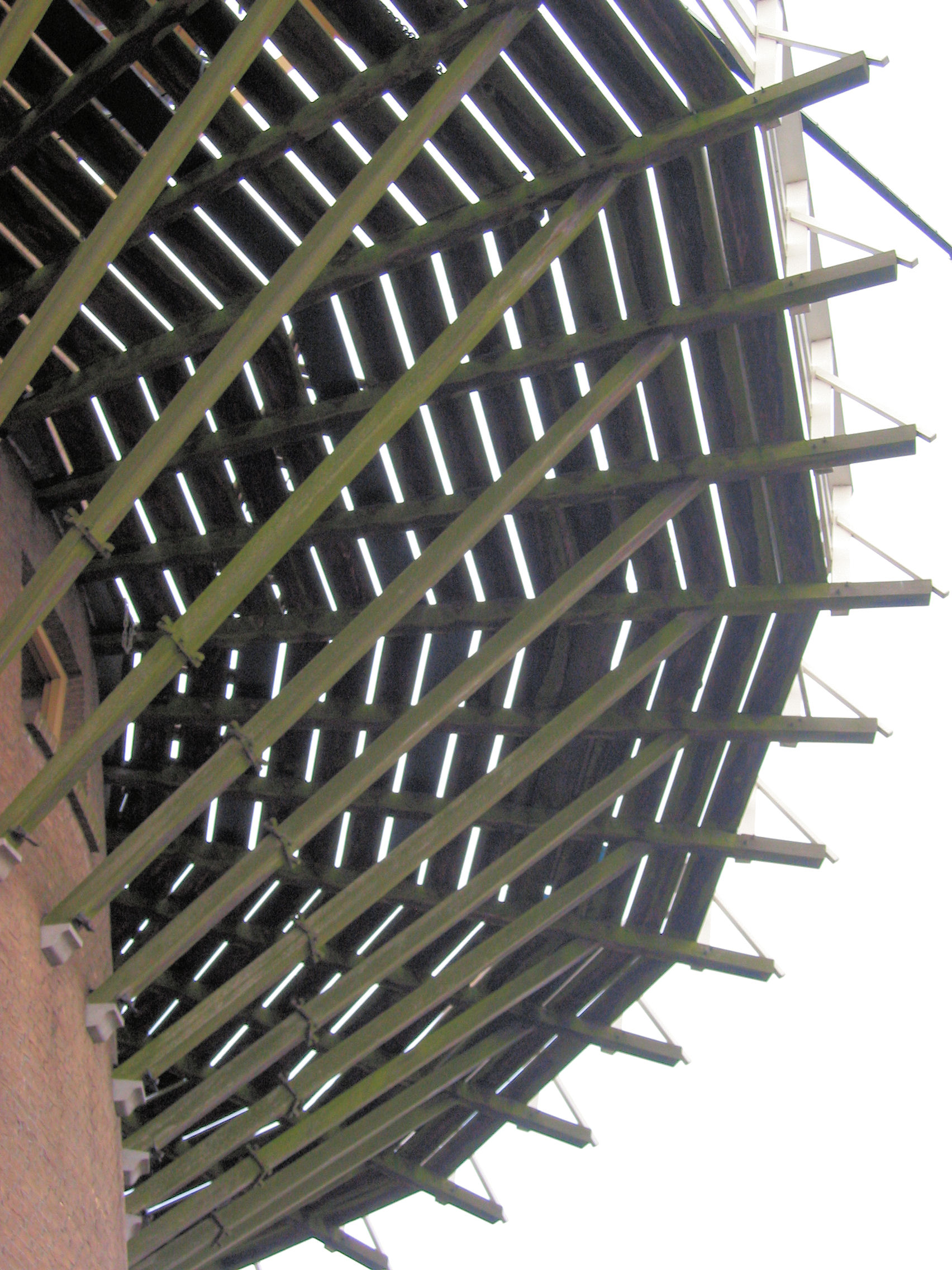 De Distilleerketel in Delfshaven, Zuid-Holland, the Netherlands